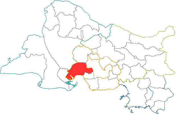 Situation du canton dans le département des Bouches du Rhône (France)